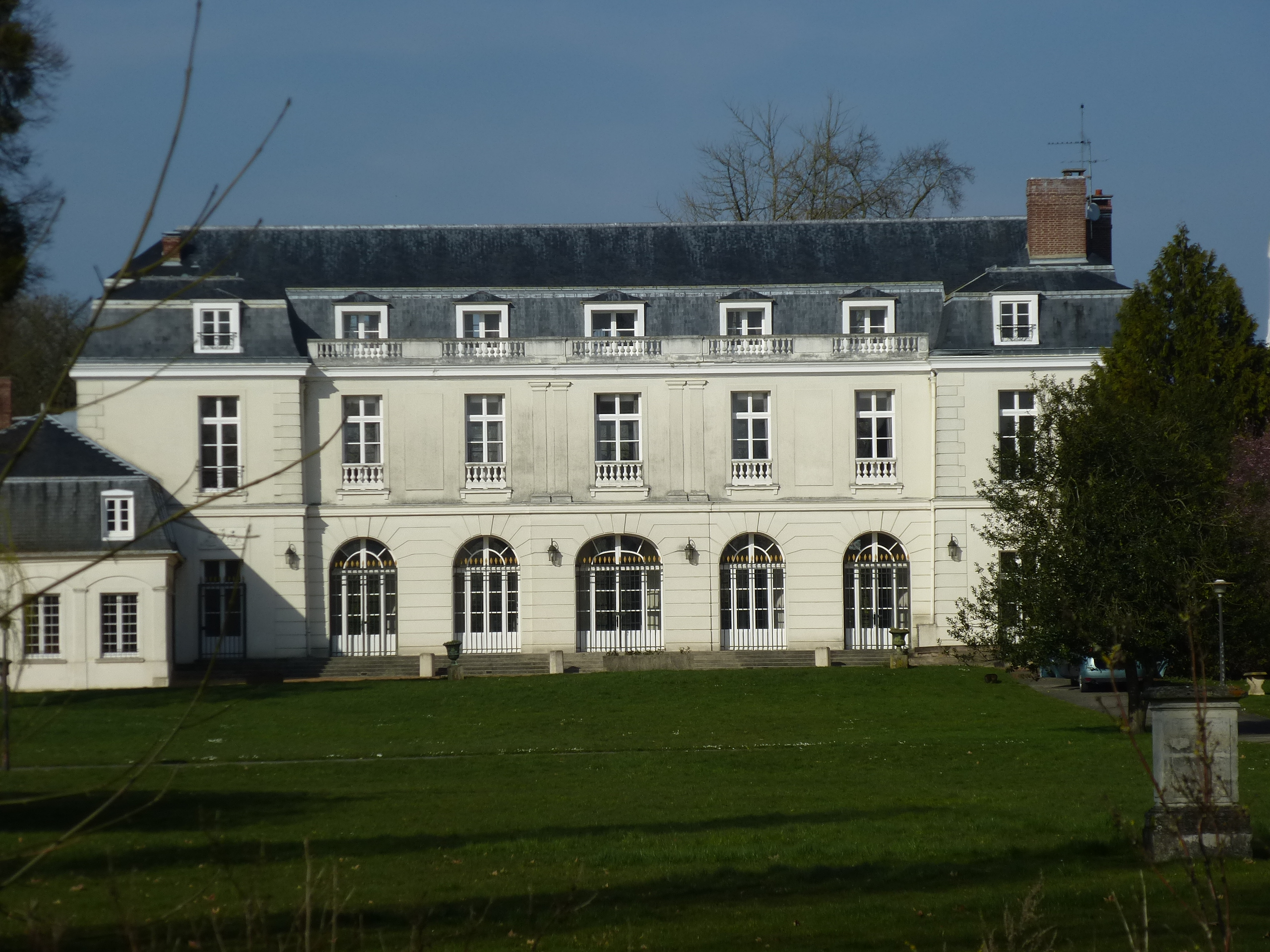 Le château de Condé-Sainte-Libiaire. (Seine-et-Marne, région Île-de-France).